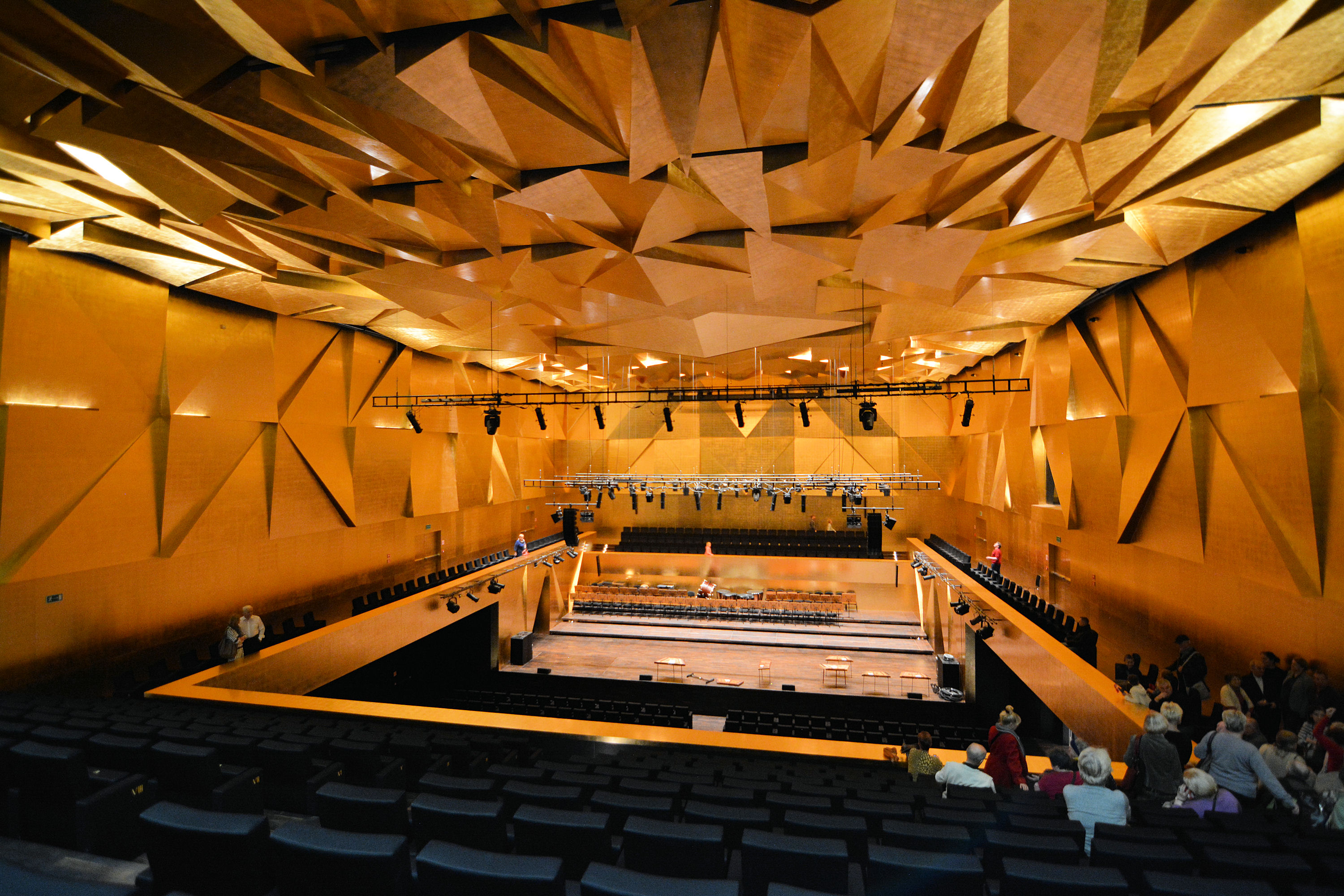 Nowy gmach filharmonii w Szczecinie - sala główna - widok z balkonu